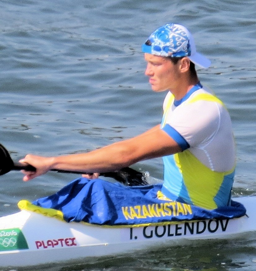 Sx50